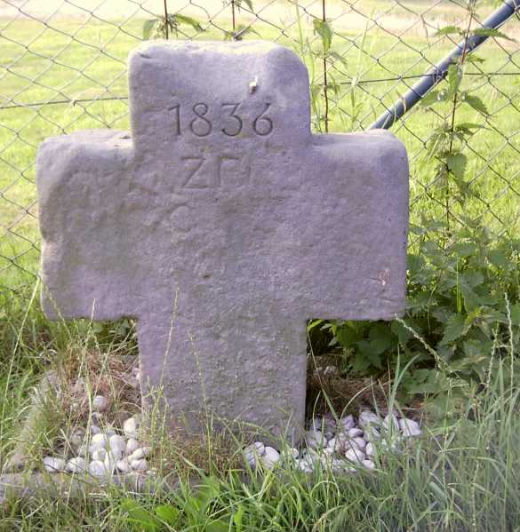 Ralshoven (Titz, NRW), Kreuzwegstation 1836